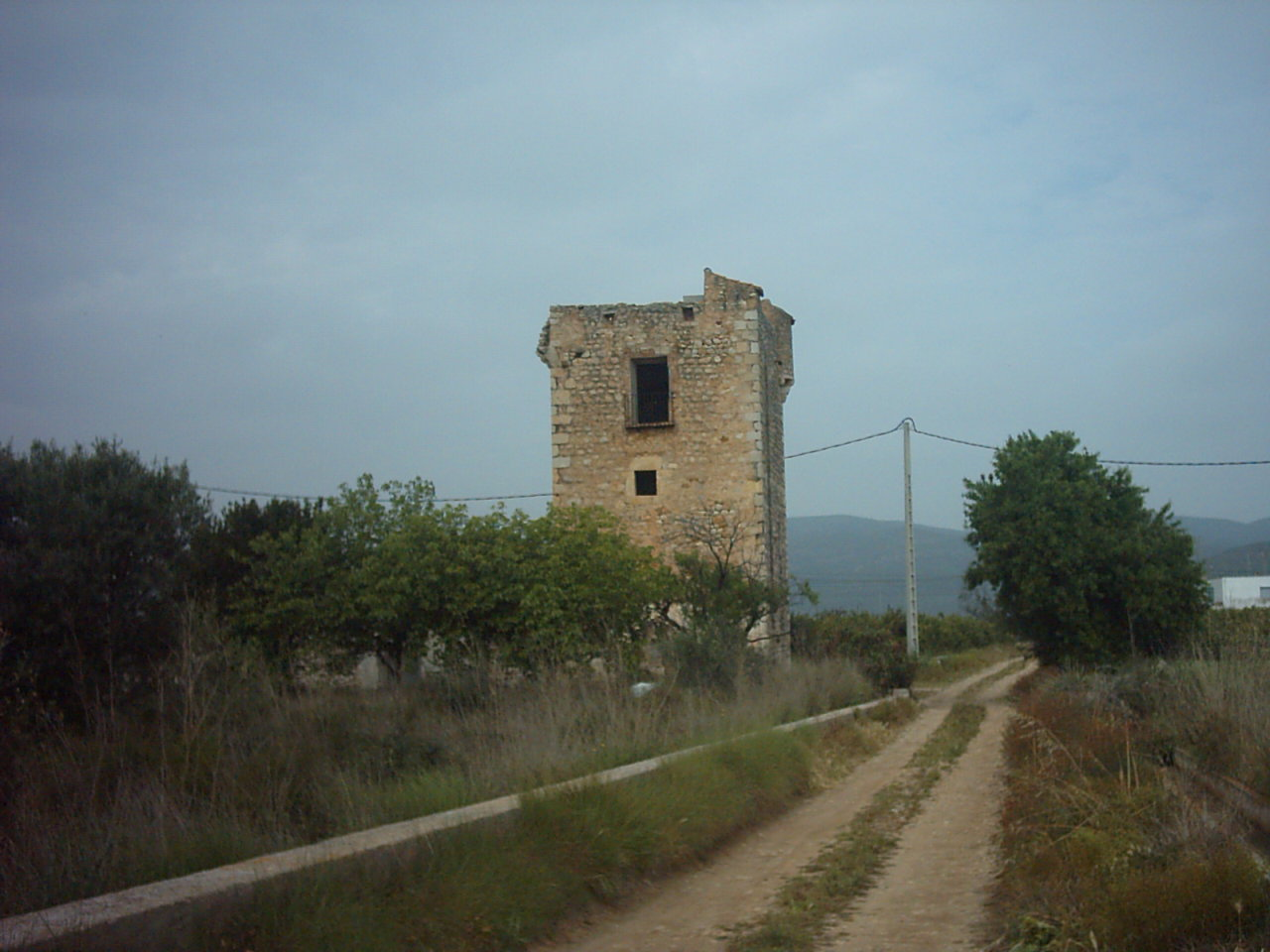 Torre del Carme (Cabanes)